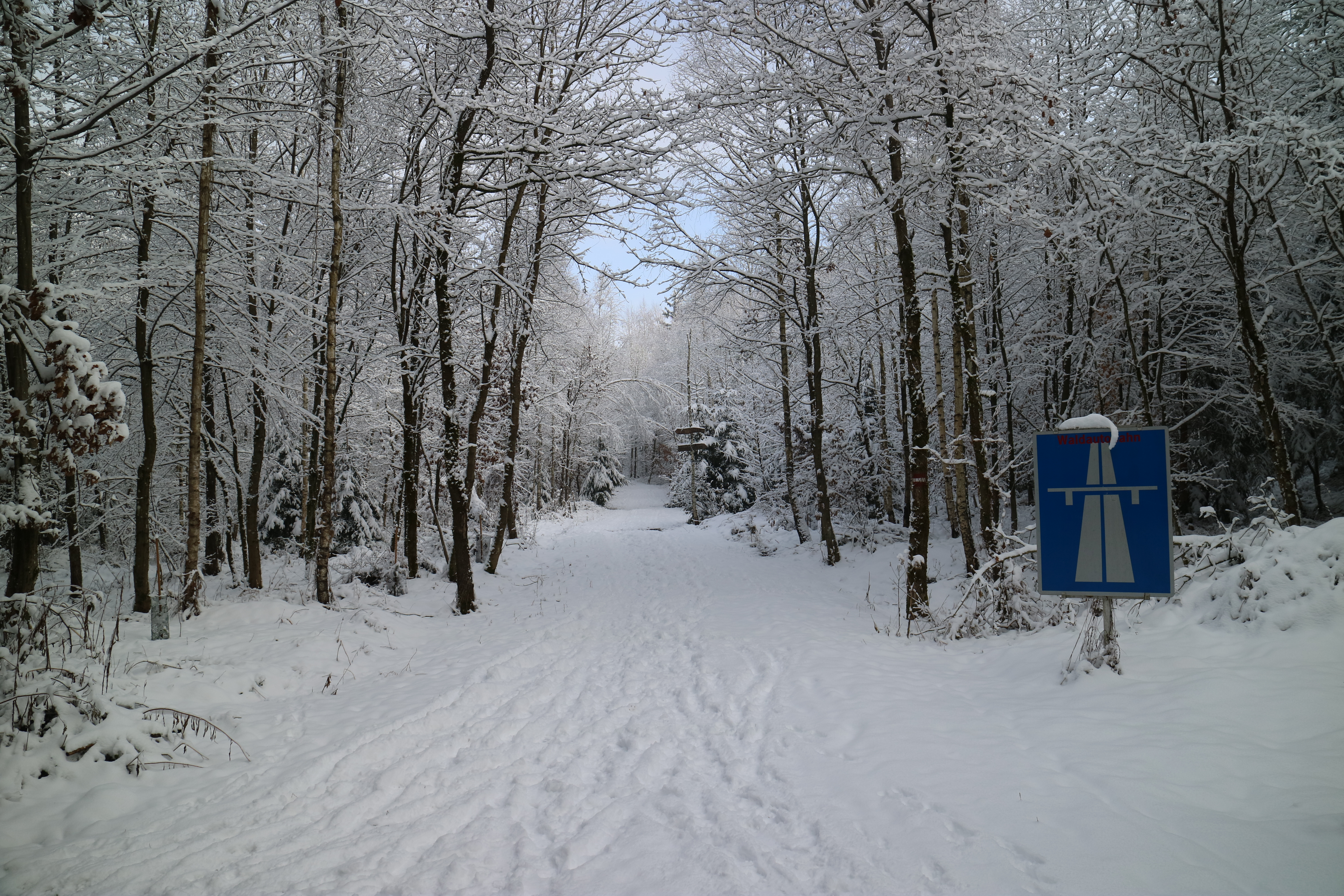 Die sogenannte „Waldautobahn“ im Kaiserwald bei Hautzendorf